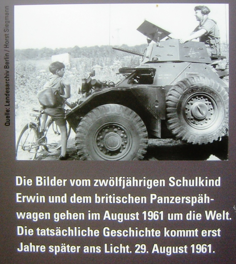 Der Junge behauptete, 1961 auf dem Weg zur Schule von Volkspolizisten aufgehalten worden zu sein und wurde danach mit einem Panzer zur Schule gebracht. 33 Jahre später räumte er ein, dass die Sache nur erfunden war. Aufgenommen auf einer Informationssäule an der Grenze zu Brandenburg im Falkenhagener Feld.